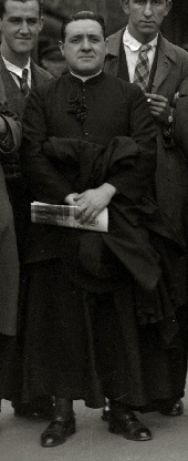 Jose Ariztimuño, Aitzol""